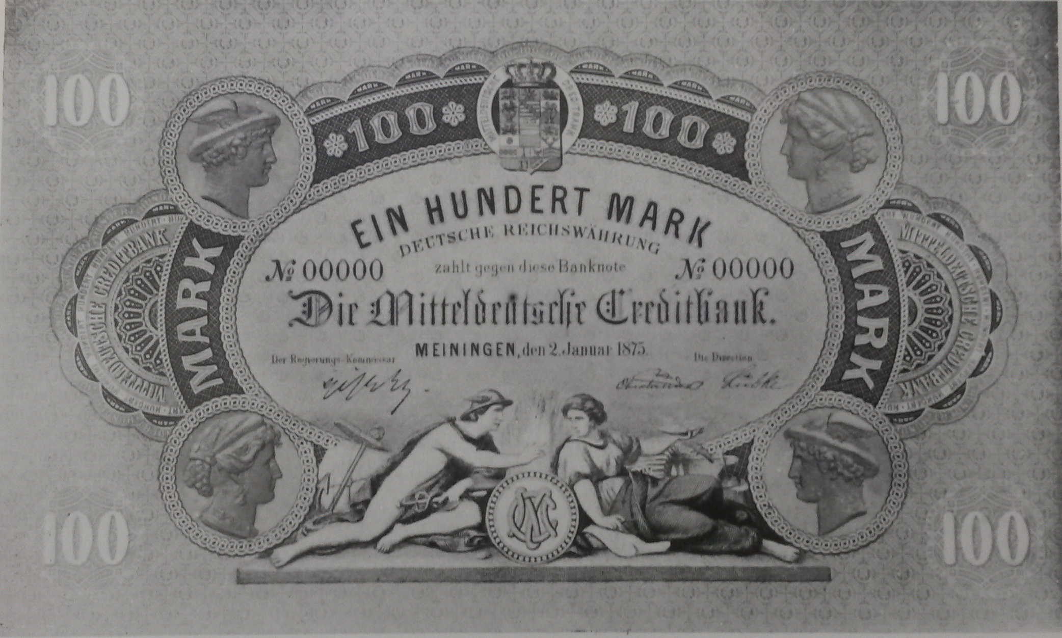 Banknote über 100 Mark der Mitteldeutsche Creditbank von 1875. Die Banknoten wurden von Dondorf & Naumann in Frankfurt gedruckt. Sie wurden wegen der Aufgabe des Banknotenprivilegs nicht mehr in Umlauf gebracht.